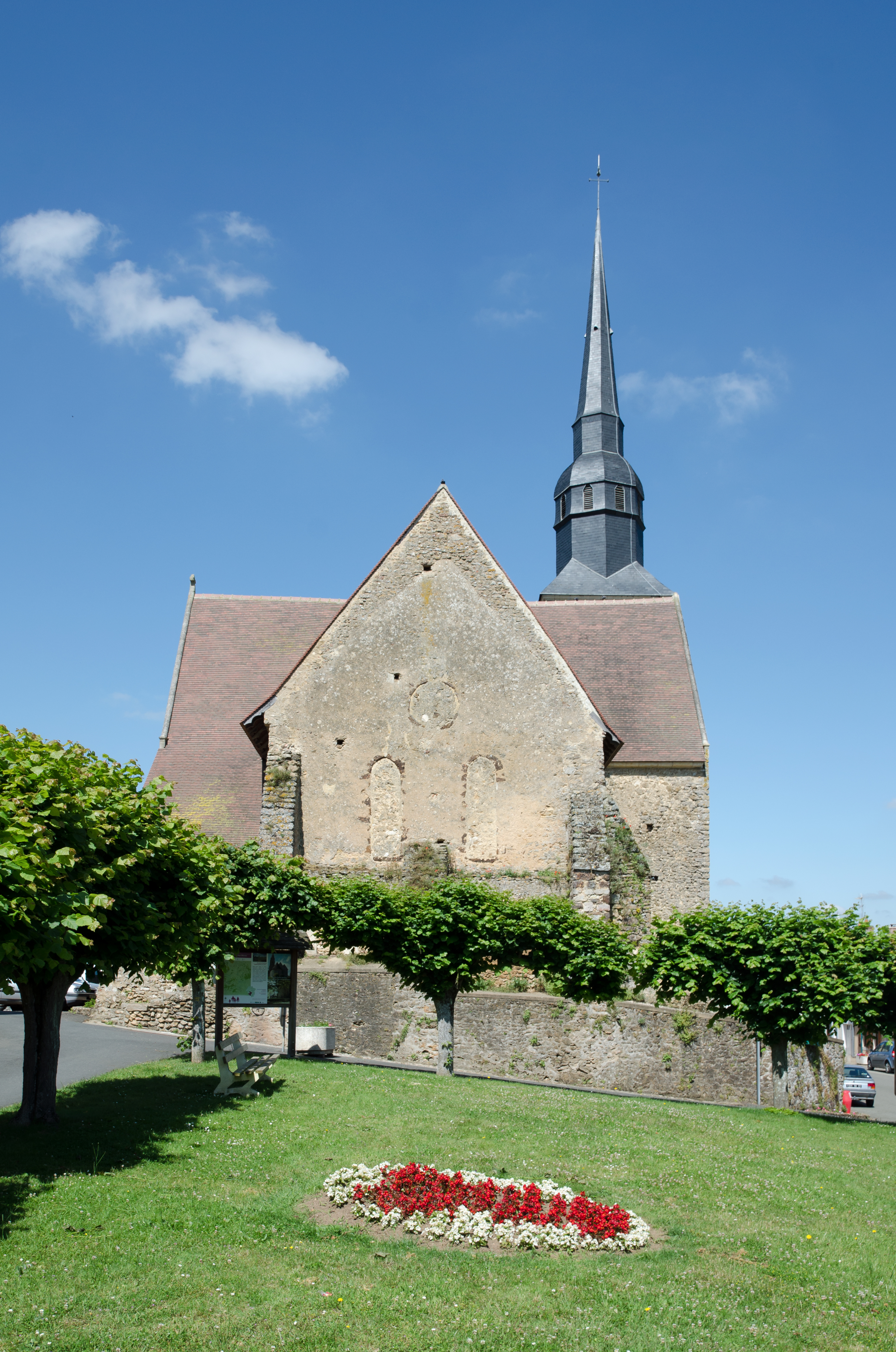 Eglise de Saint-Michel-de-Chavaignes, Sarthe.